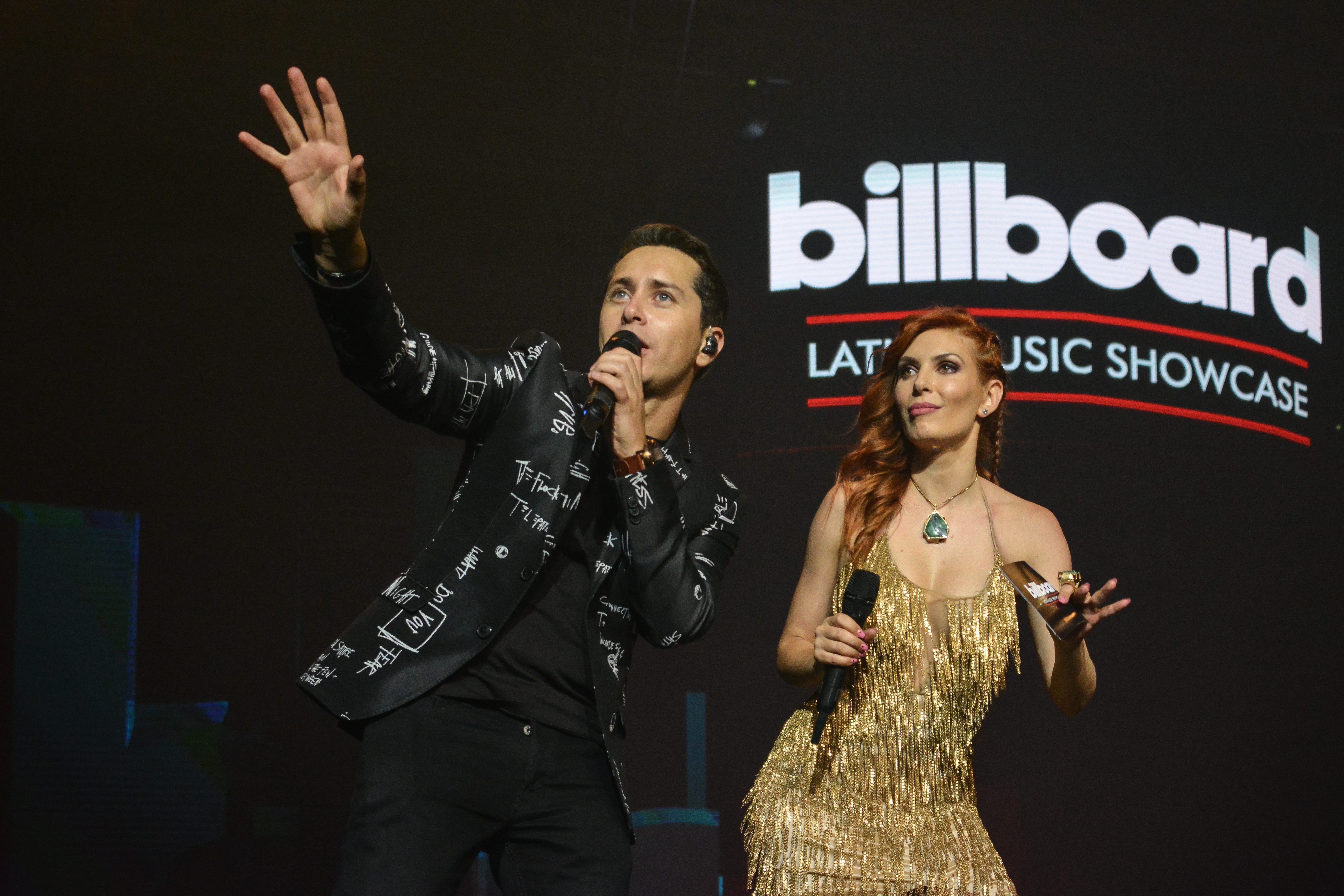 Billboard Latin Music Showcase Chile 2018, Movistar Arena, Santiago, Chile